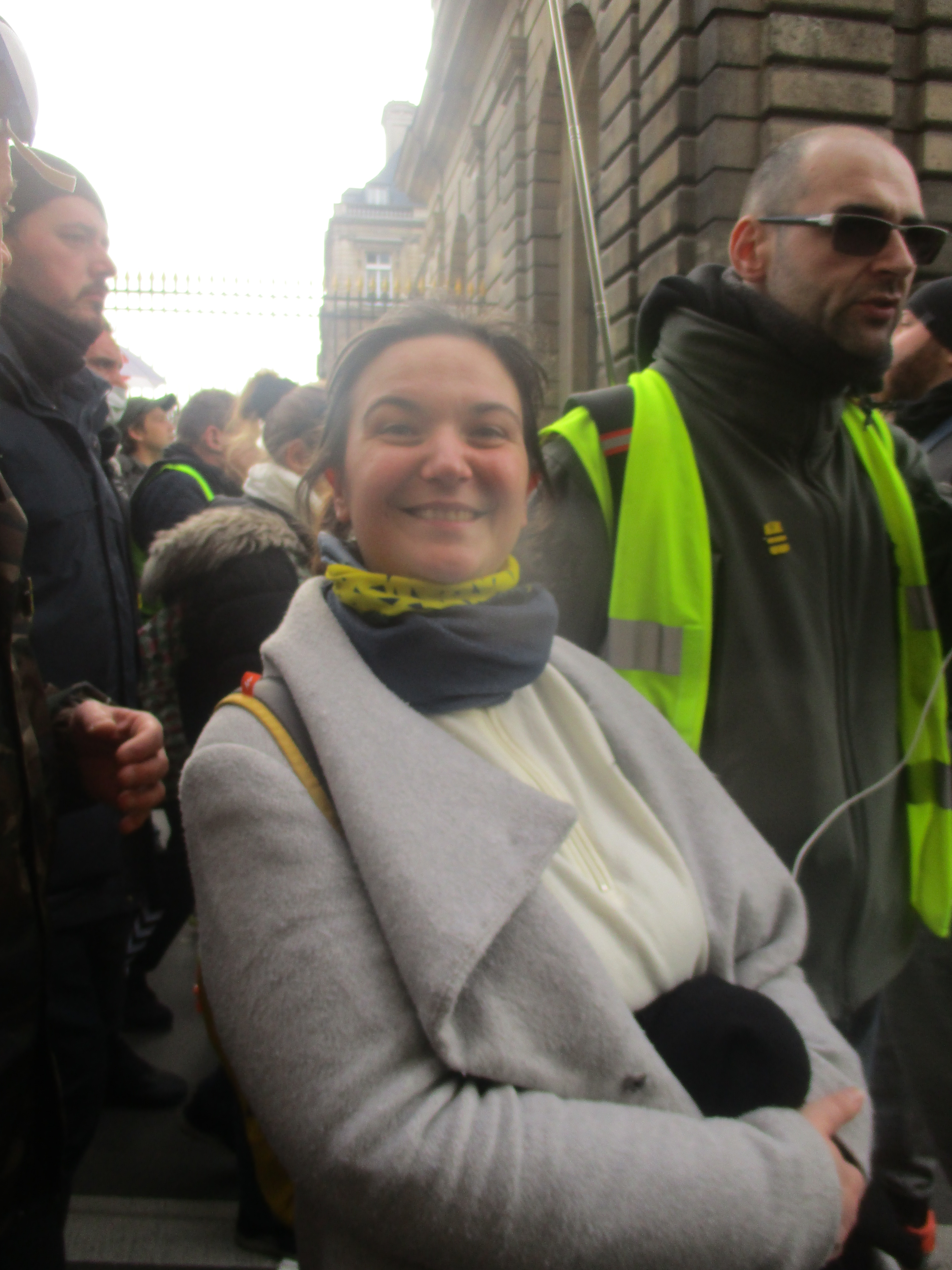 Laetitia Dewalle, une des porte-paroles des gilets jaunes du Val-d'Oise, à la manif des gilets jaunes du 9 février 2019 devant le Sénat.